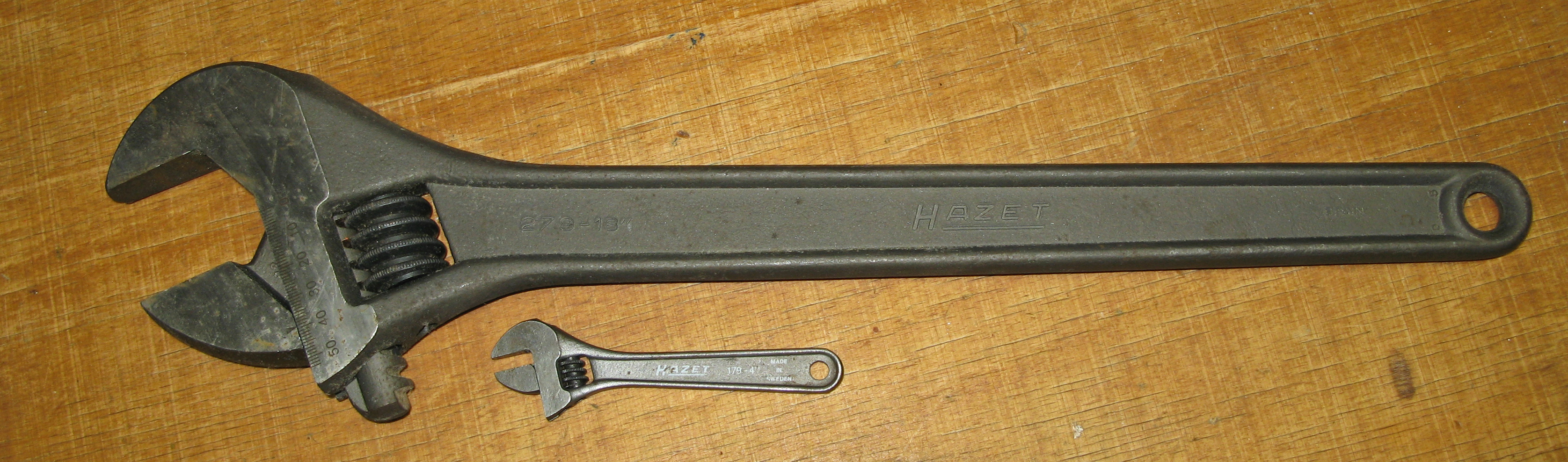 Zwéin Englänner.